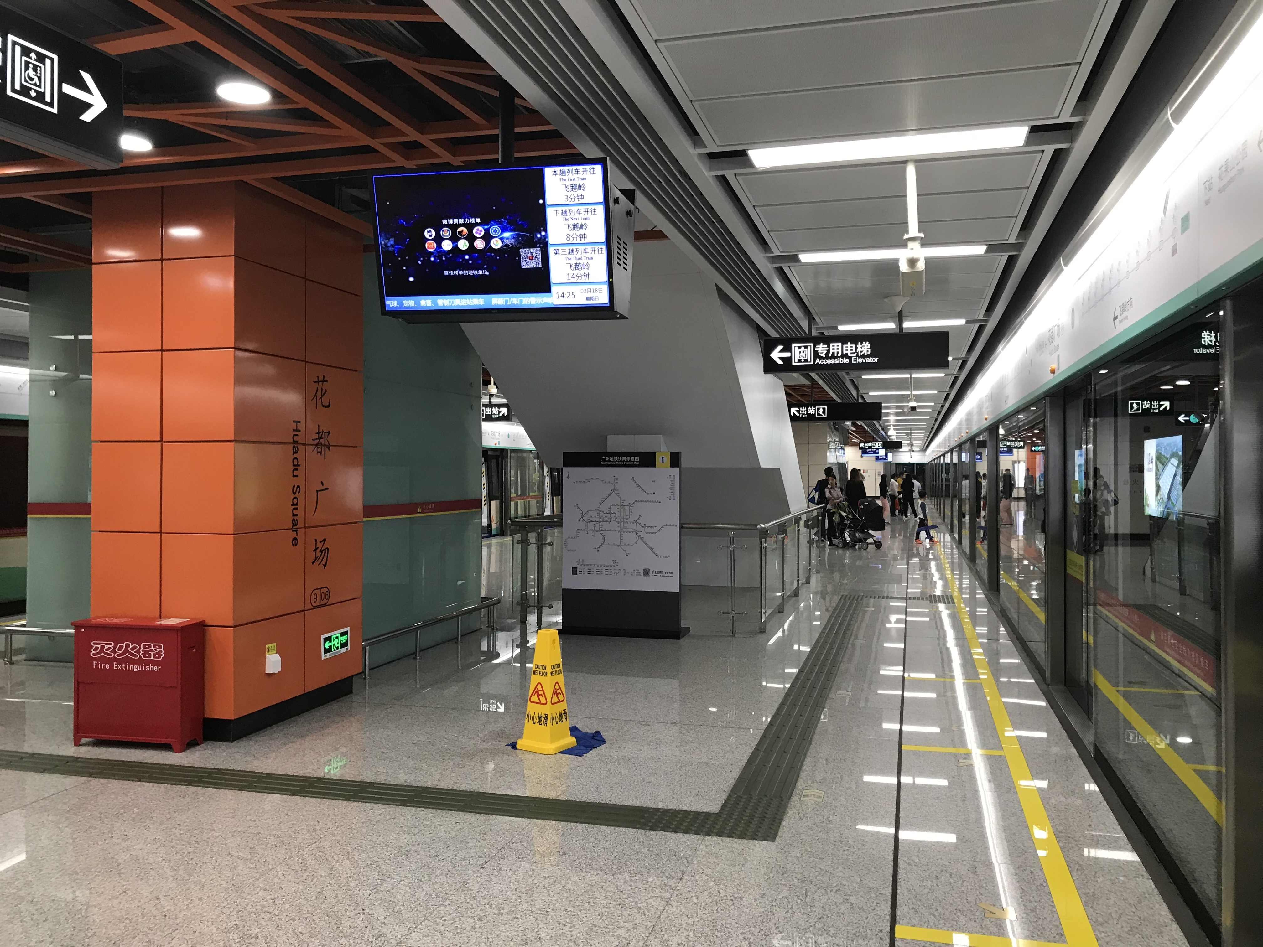 广州地铁花都广场站